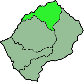 Mappa della diocesi cattolica di Leribe, in Lesotho.